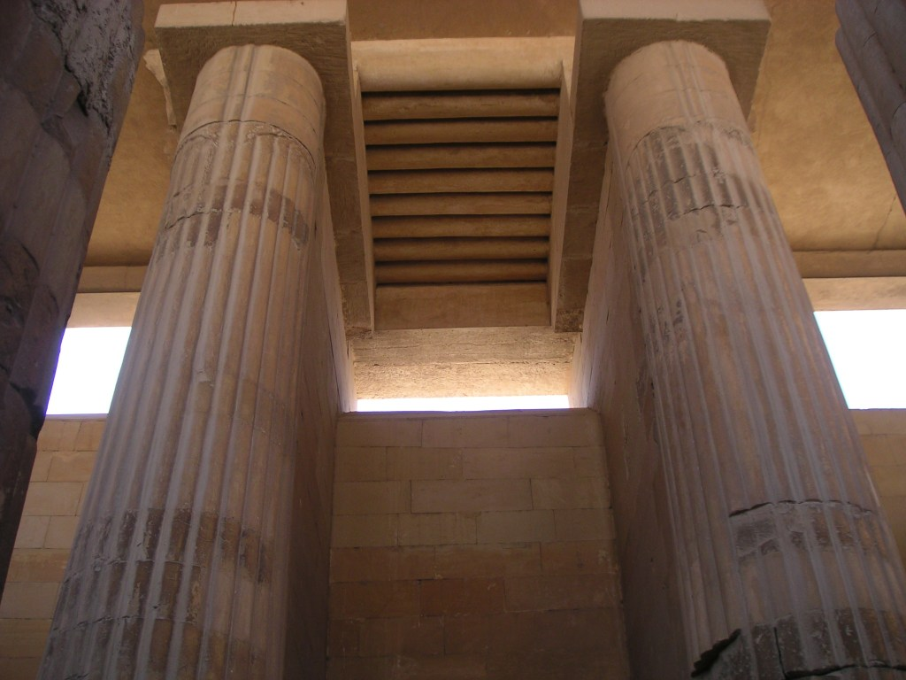 Colonnes du corridor du complexe funéraire de Djéser avec un plafond en fac similé de poutre de bois - Saqqarah - IIIe dynastie égyptienne